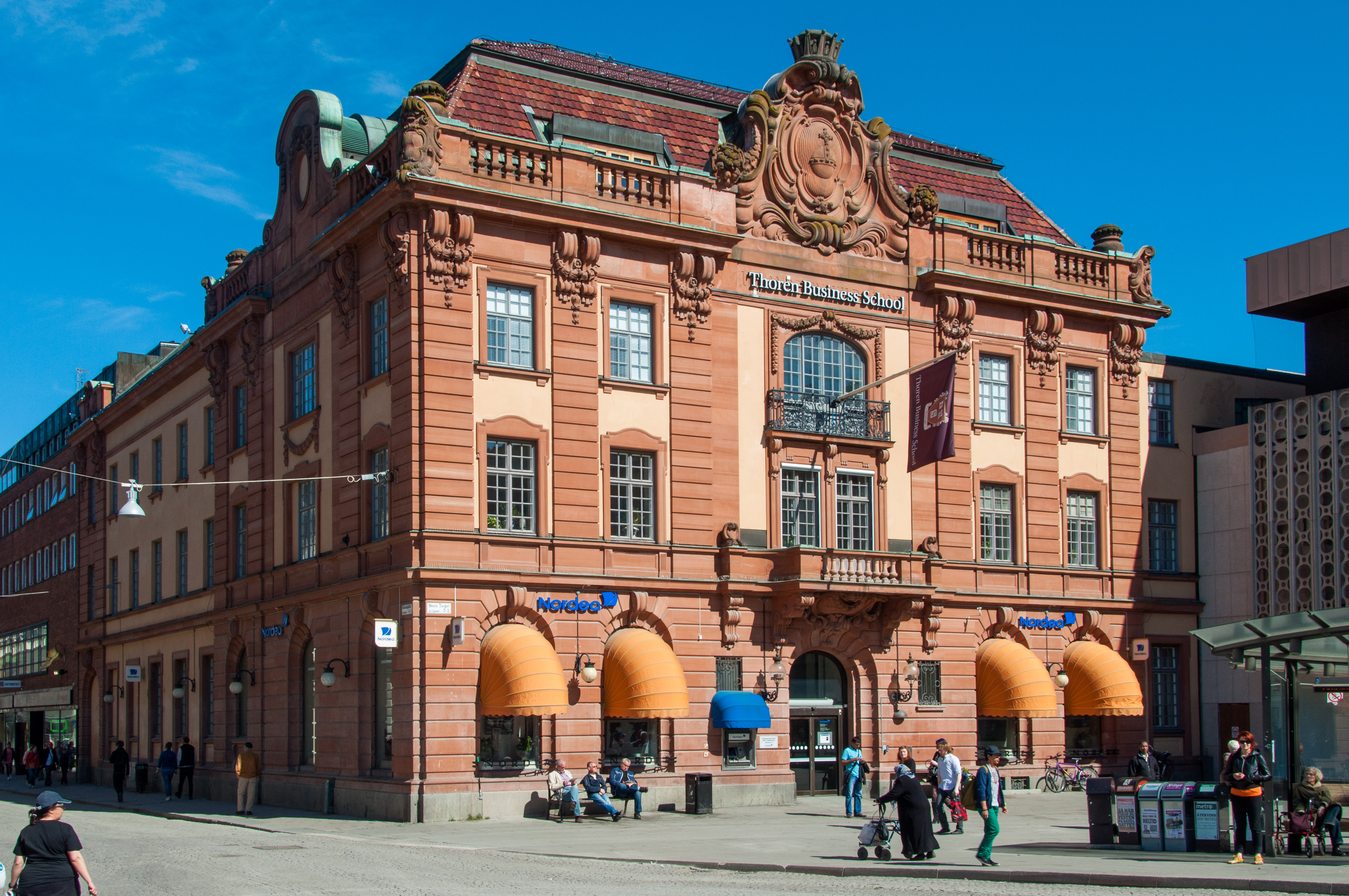 Uplandsbanken, StoraTorget 7 i Uppsala, Byggnadsår 1906-1909. Arkitekt Ture Stenberg